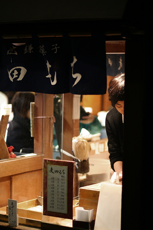 @Komachi Dori Street, KamakuraSee also:Kamakura Goro (Japanese only)Mugita-Mochi [ 小町通り / 鎌倉 ]